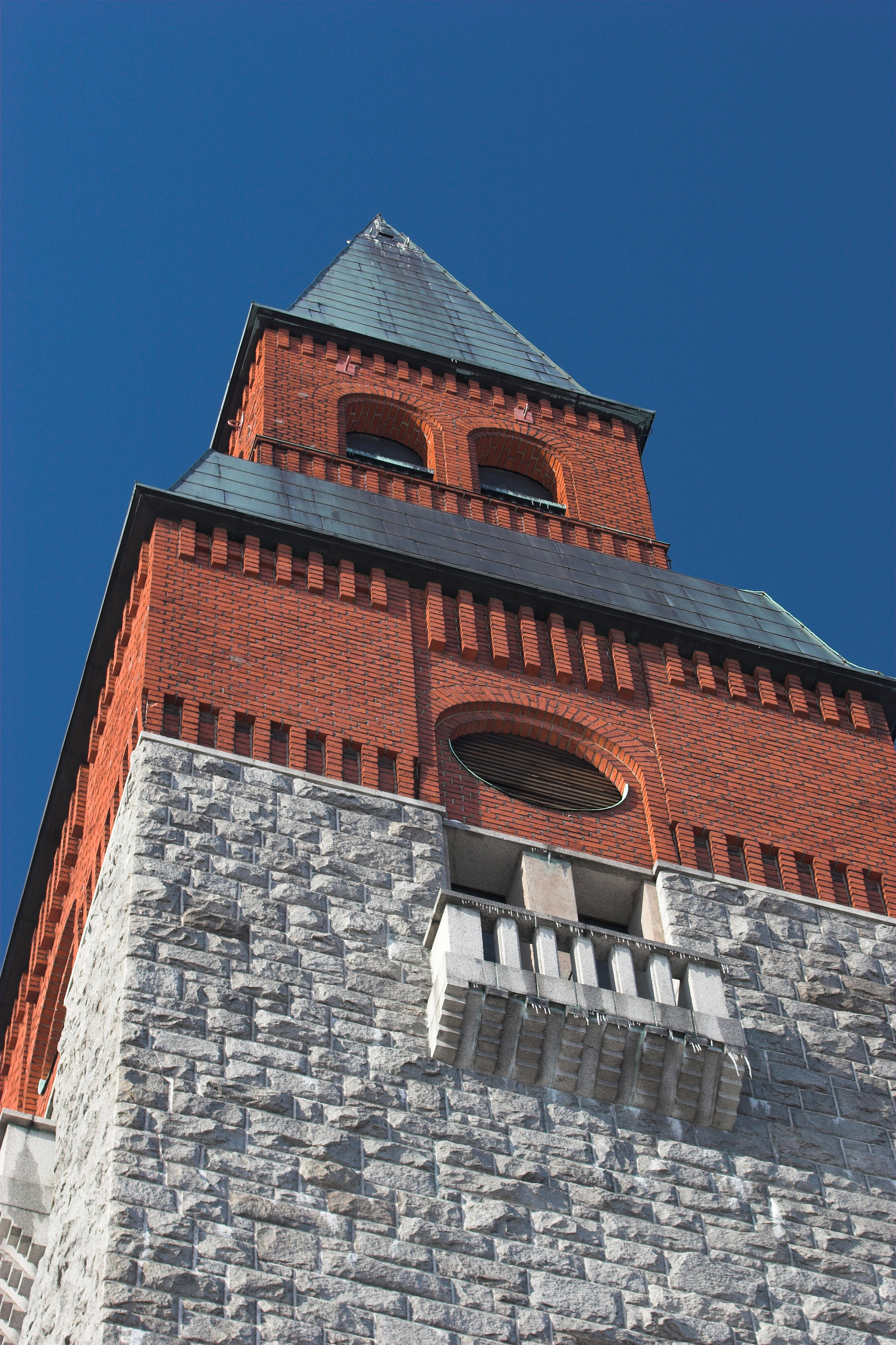 Kansallismuseon tornista ottamani kuva.